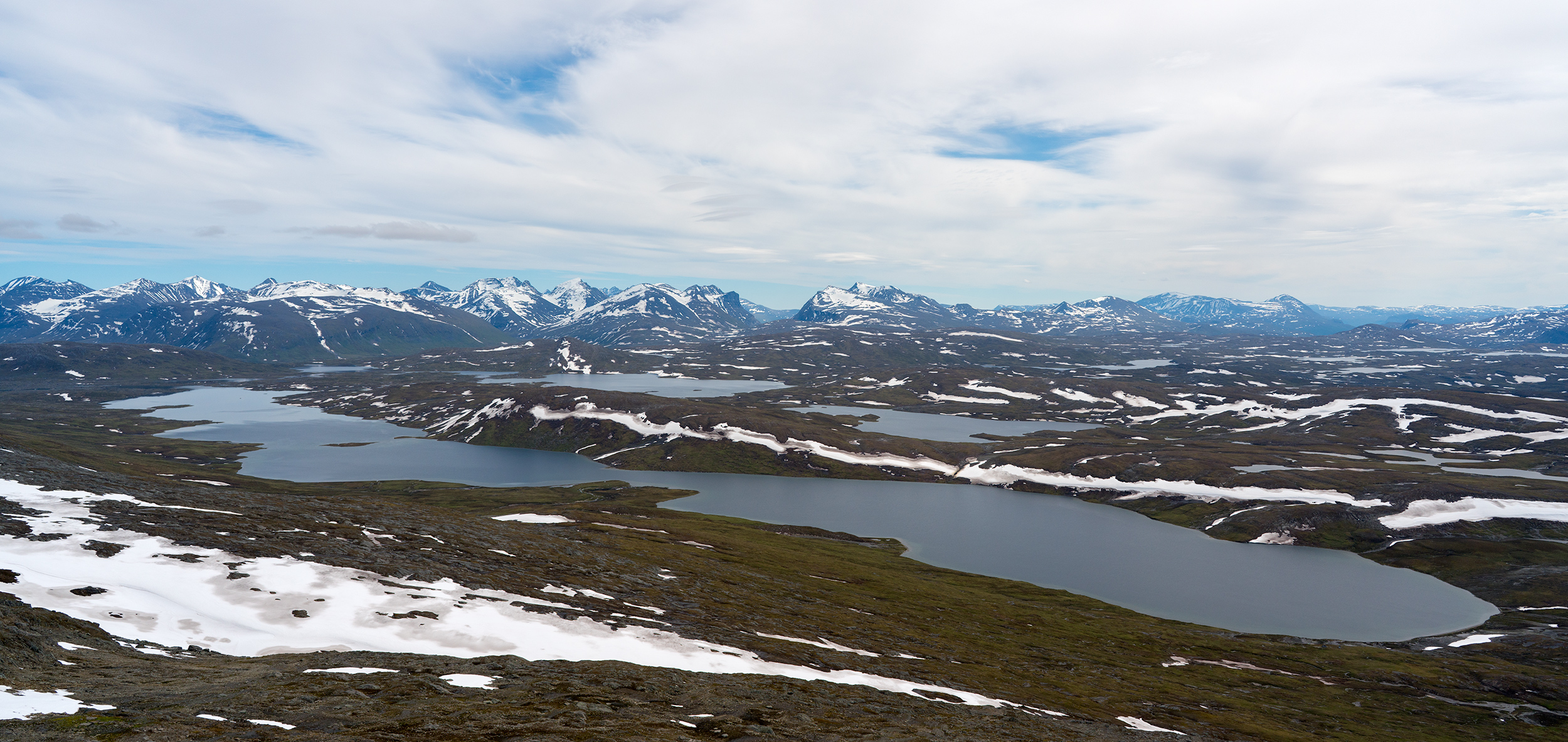 Vy mot Àlájávrre från 1430 på Álátjåhkkå.